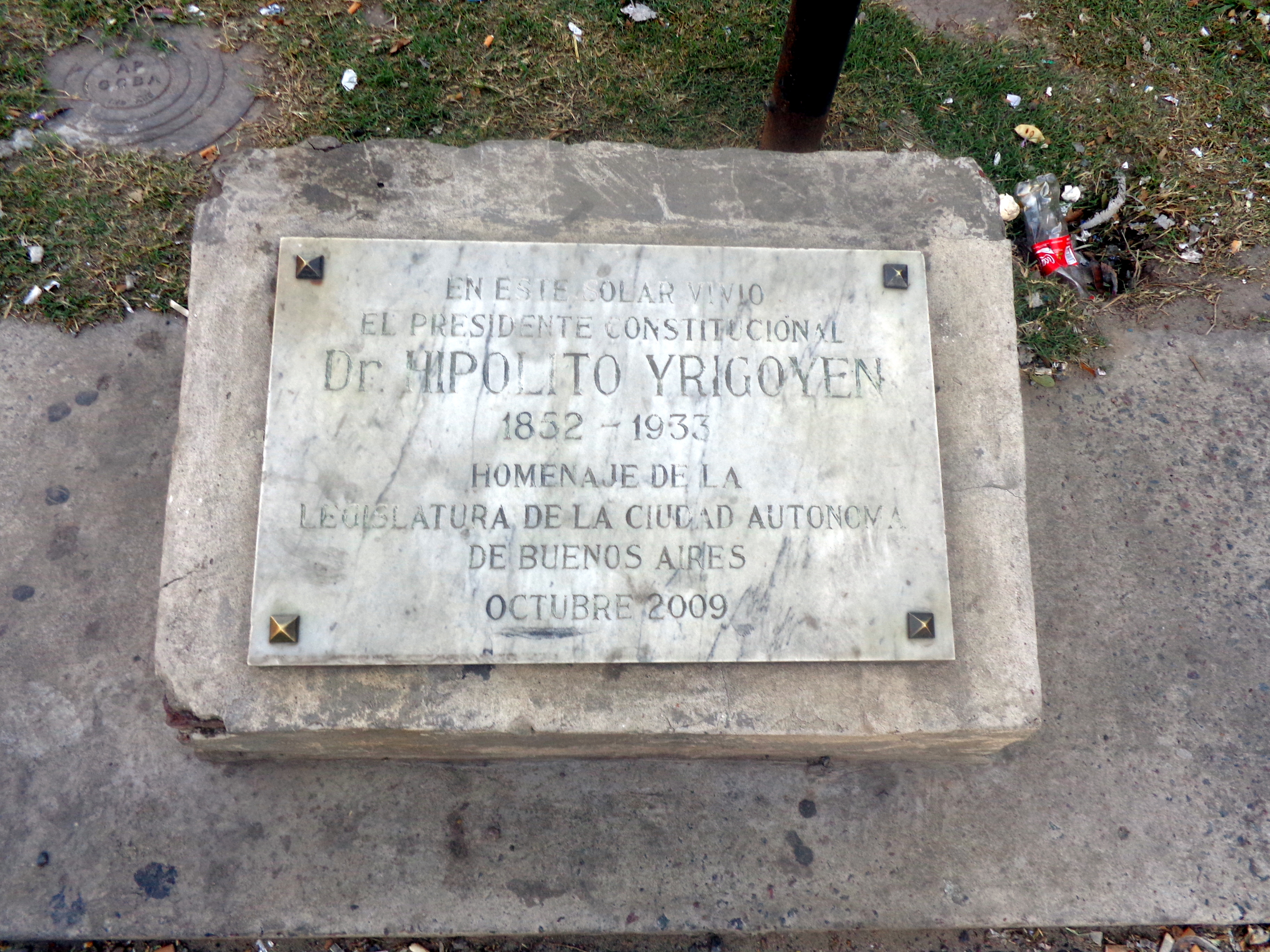 Placa recordatoria del solar dónde estuvo la casa de Hipólito Yrigoyen, en avenida Brasil, entre Bernardo de Irigoyen y la autopista 9 de Julio. Buenos Aires, Argentina.